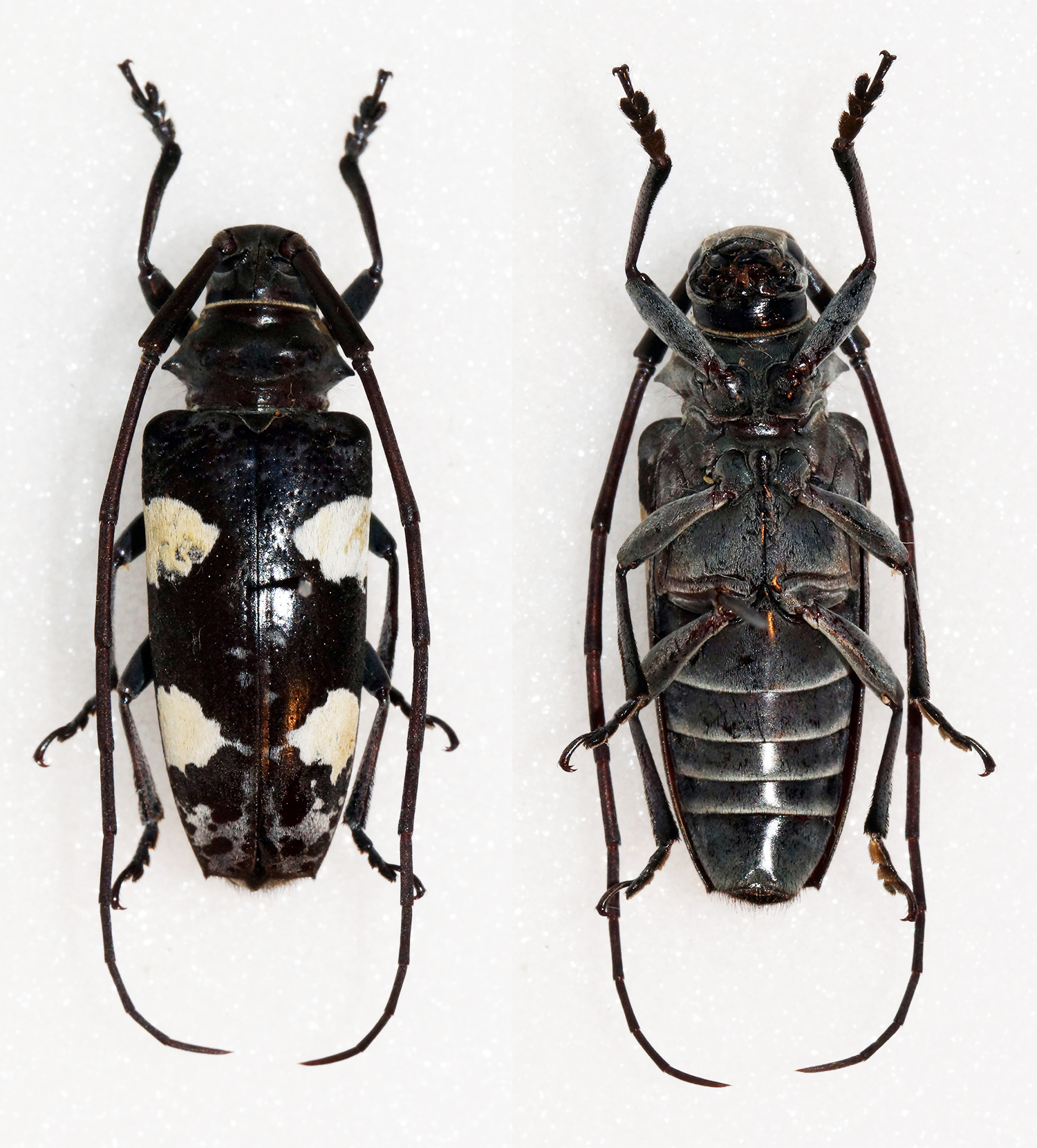 Breuning,1938 Sex: ? Data: 04-04-06 - Ranau - Sabah - Malaysia Size: 21mm